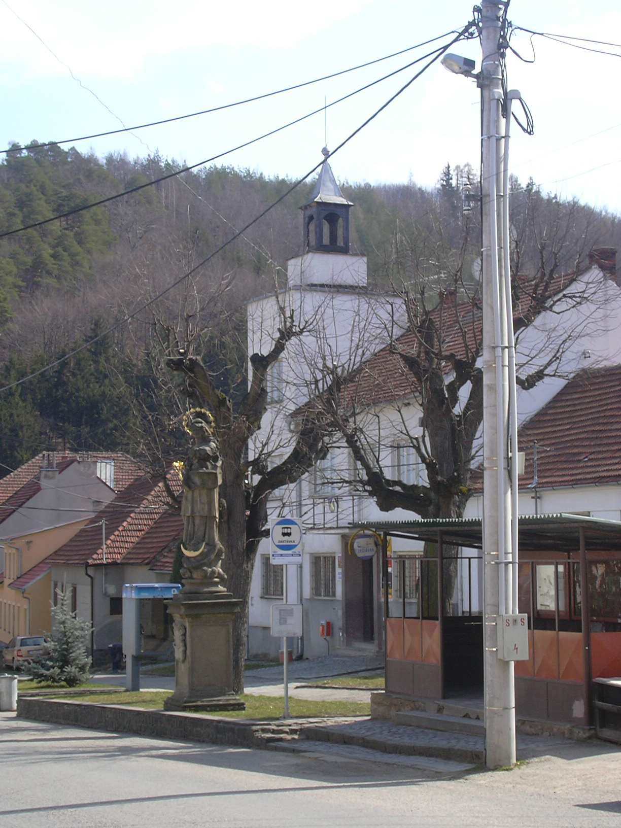 Obecní úřad Račice, socha Immaculaty a obecní úřad v pozadí(Vyškov District, Czech Republic)